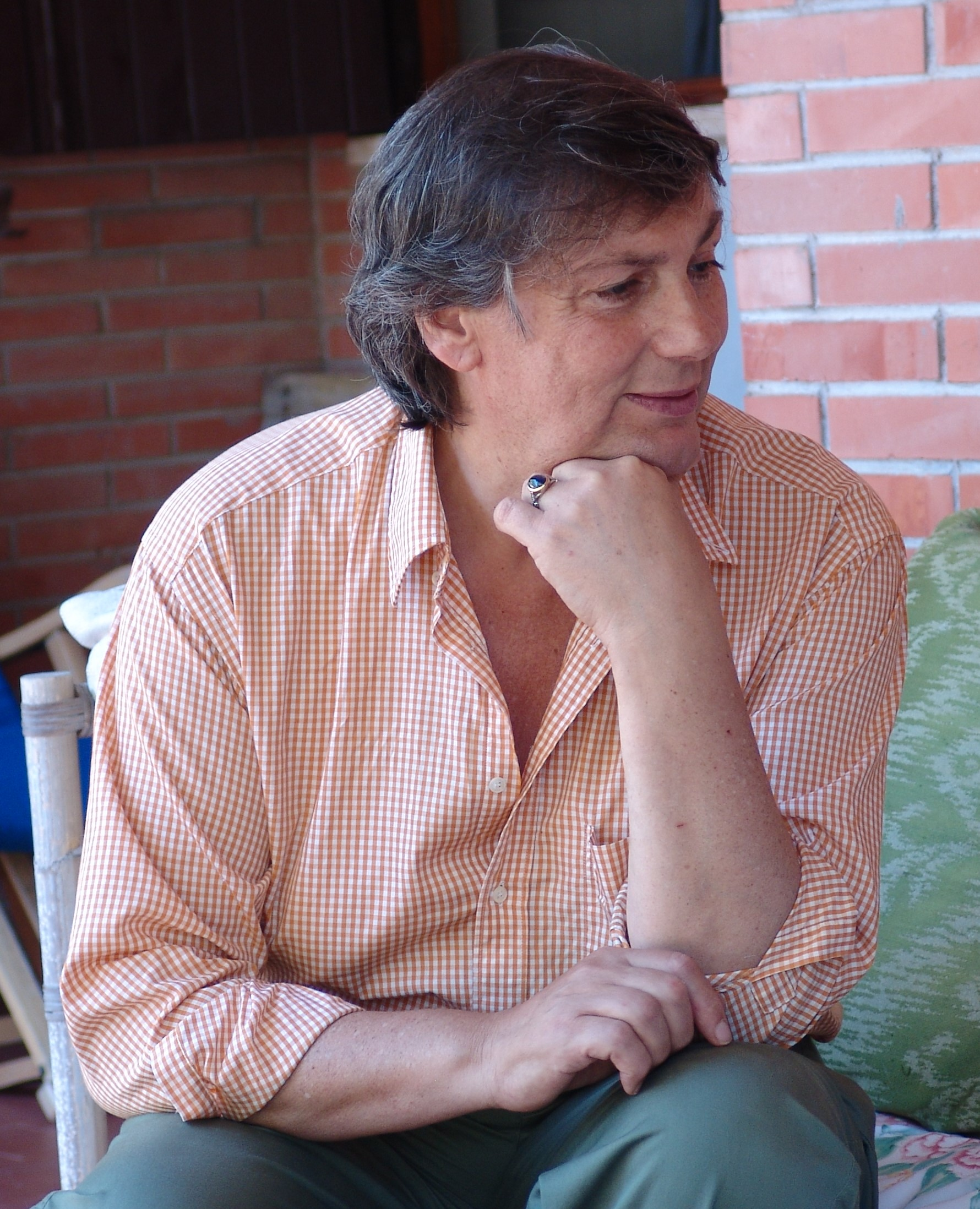 Interlingua: Foto raffigurante Italo Benedetti